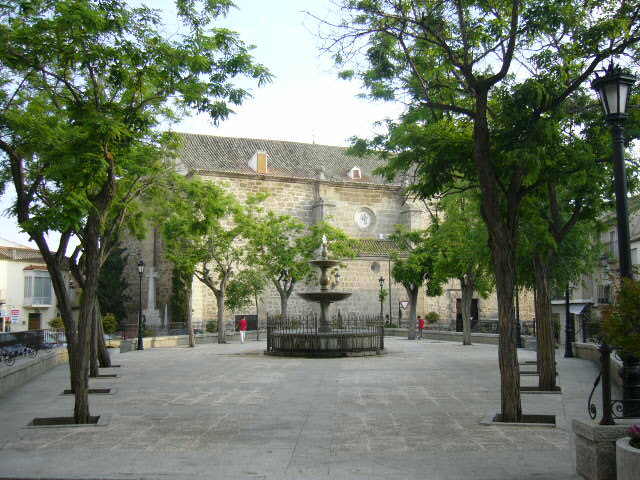 Glorieta y fuente